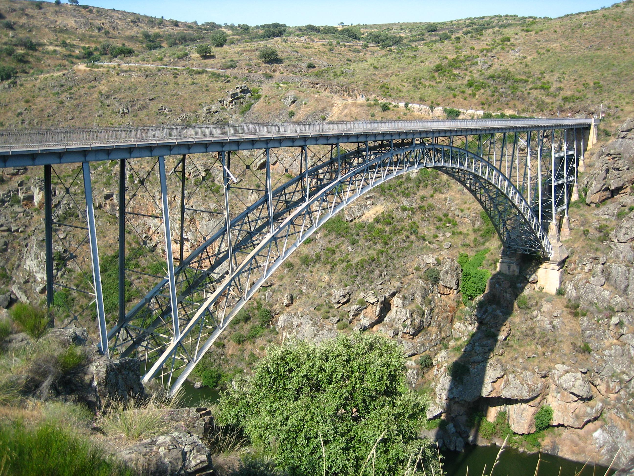 Puente sobre el río Duero, Pino, Zamora, España y castilla y leon